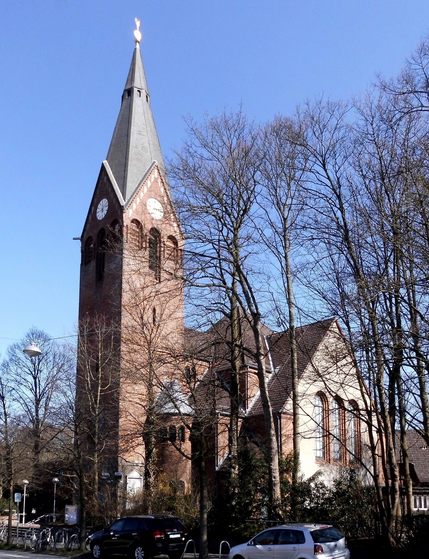 Katholische Kirche St. Heinrich im Kieler Stadtteil Blücherplatz